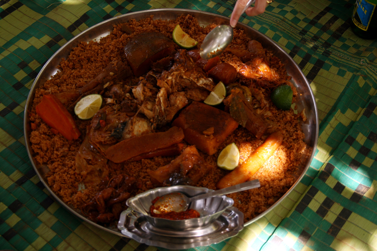 Tiep bou dijen, spécialité de poisson sénégalaise